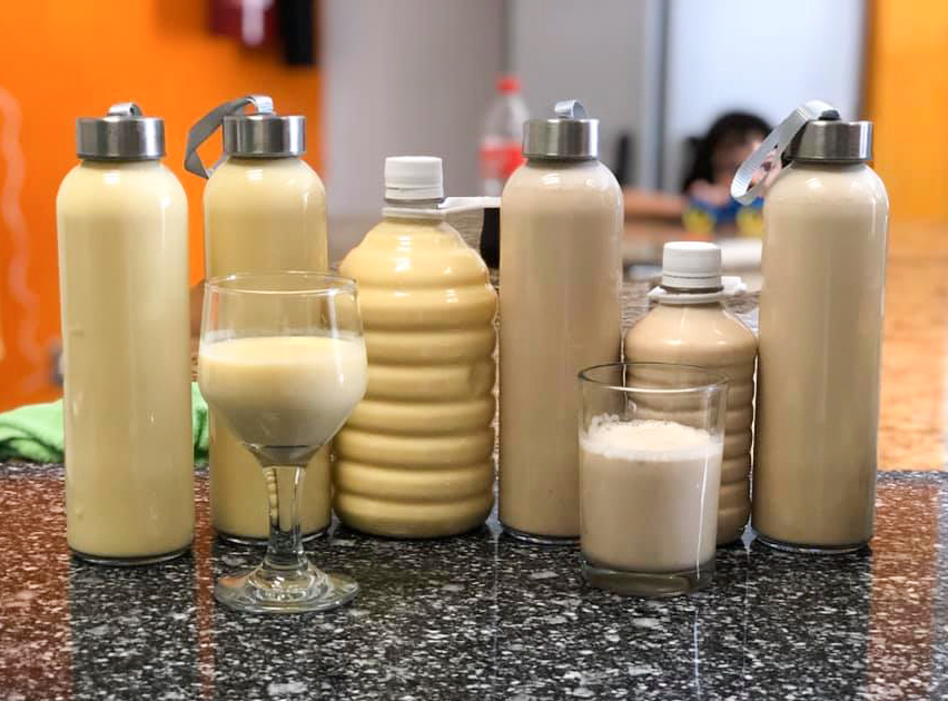 Torito, bebida veracruzana por excelencia.